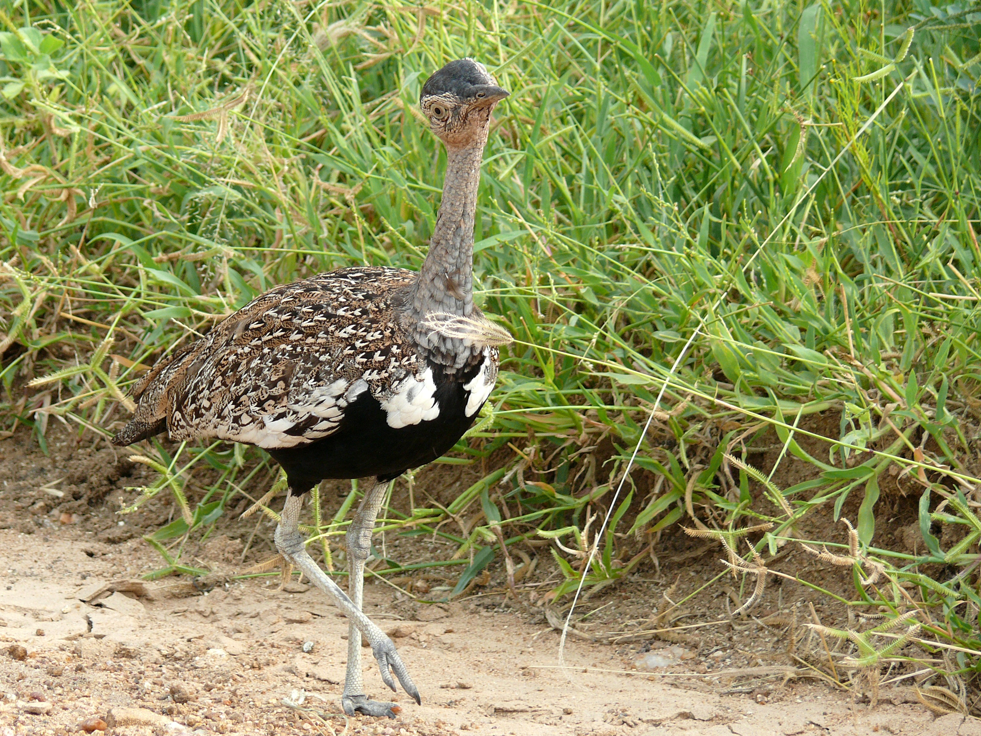 S21 West of Lower Sabie, Kruger NP, SOUTH AFRICA